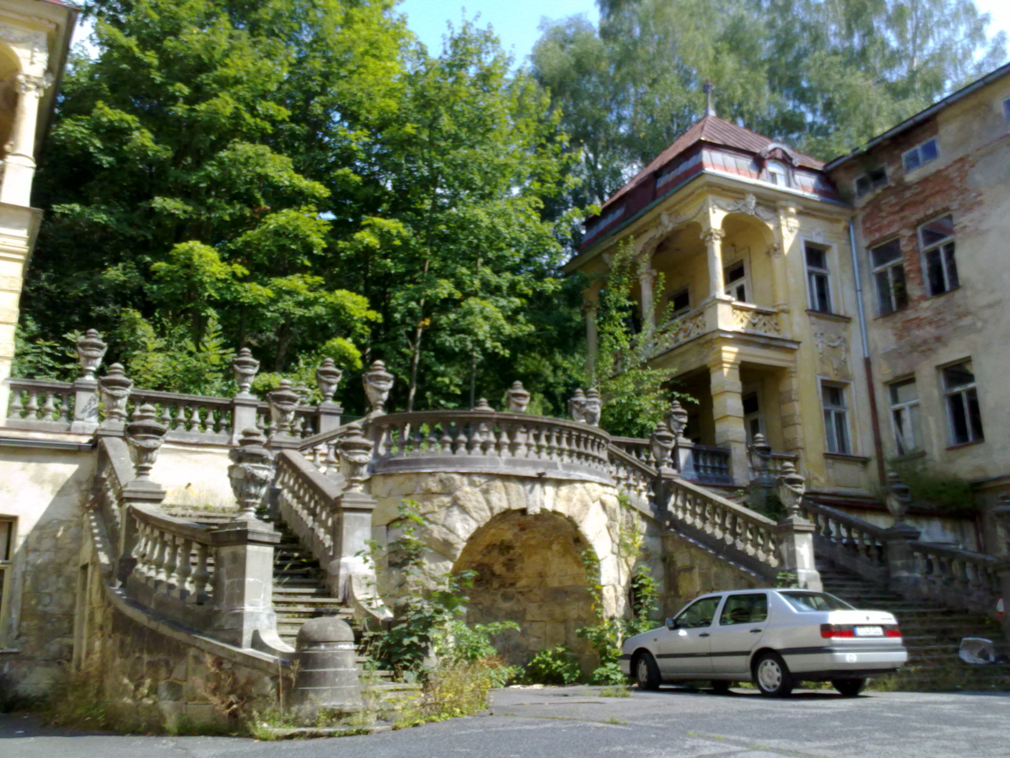 Lázeňský dům Weimar (Kavkaz), Mariánské Lázně, Goethovo náměstí 9/15